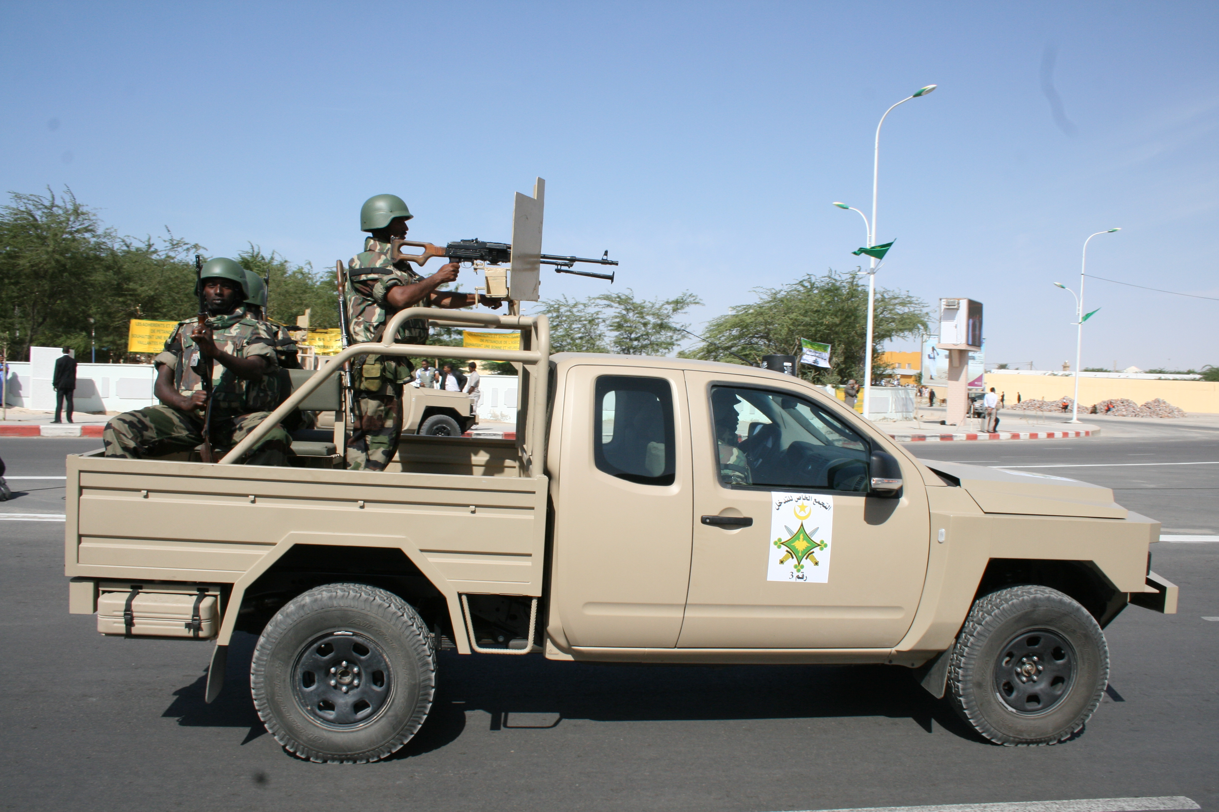 Mauritanian security forces have been dispatched to three border zones to protect against al-Qaeda attacks. إرسال تشكيلات من قوات الأمن الموريتاني إلى ثلاث مناطق حدودية لمنع هجمات القاعدة. Plusieurs unités de forces de sécurité mauritanienne ont pris position dans trois zones frontalières pour assurer la protection contre les attaques d'al-Qaida.